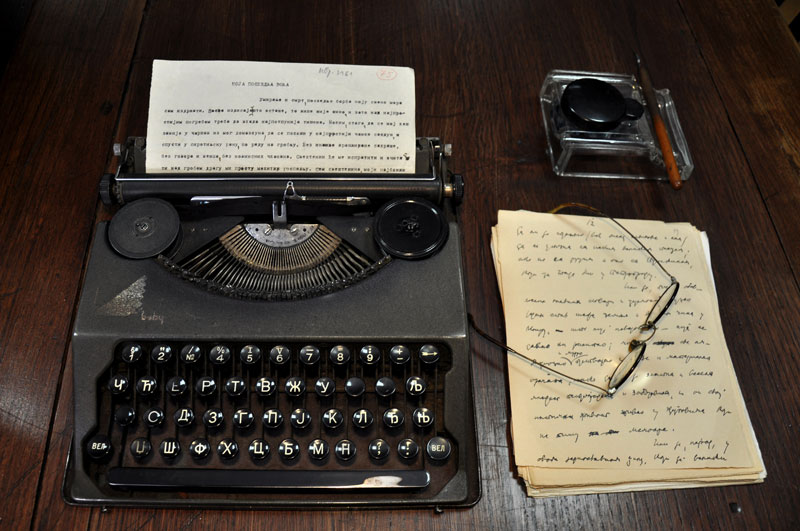 Српски (ћирилица): Писаћи прибор Исидоре Секулић